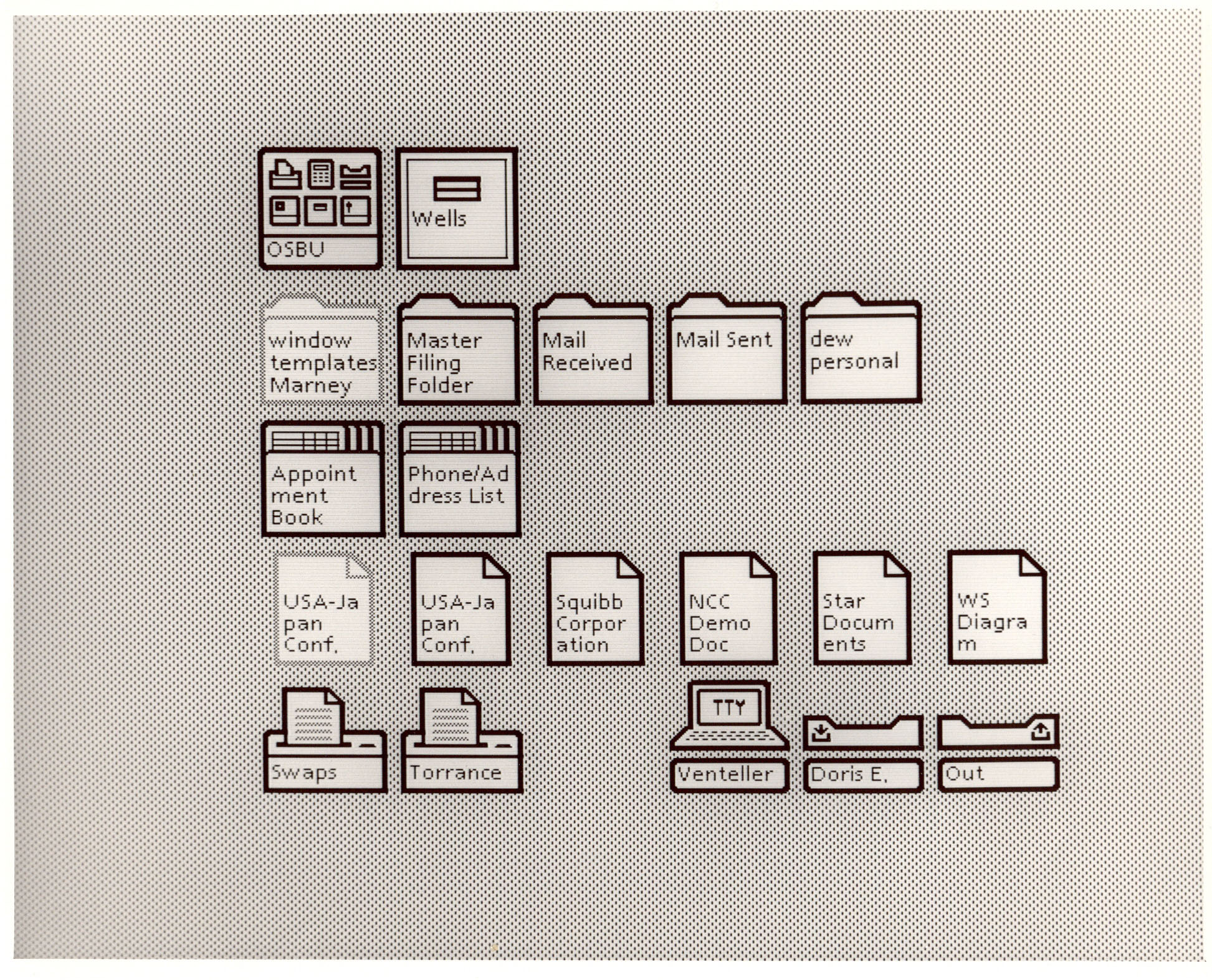 Desktop icons for ViewPoint on Xerox Star 8010